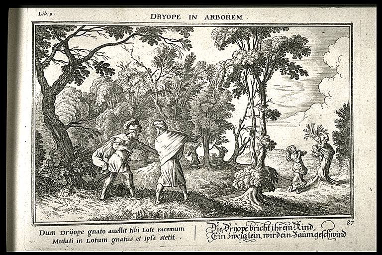 Information Imagem extraída da obra Metamorfoses de Ovído. Dríope transformada em lótus; Dryope transformed into lothus tree